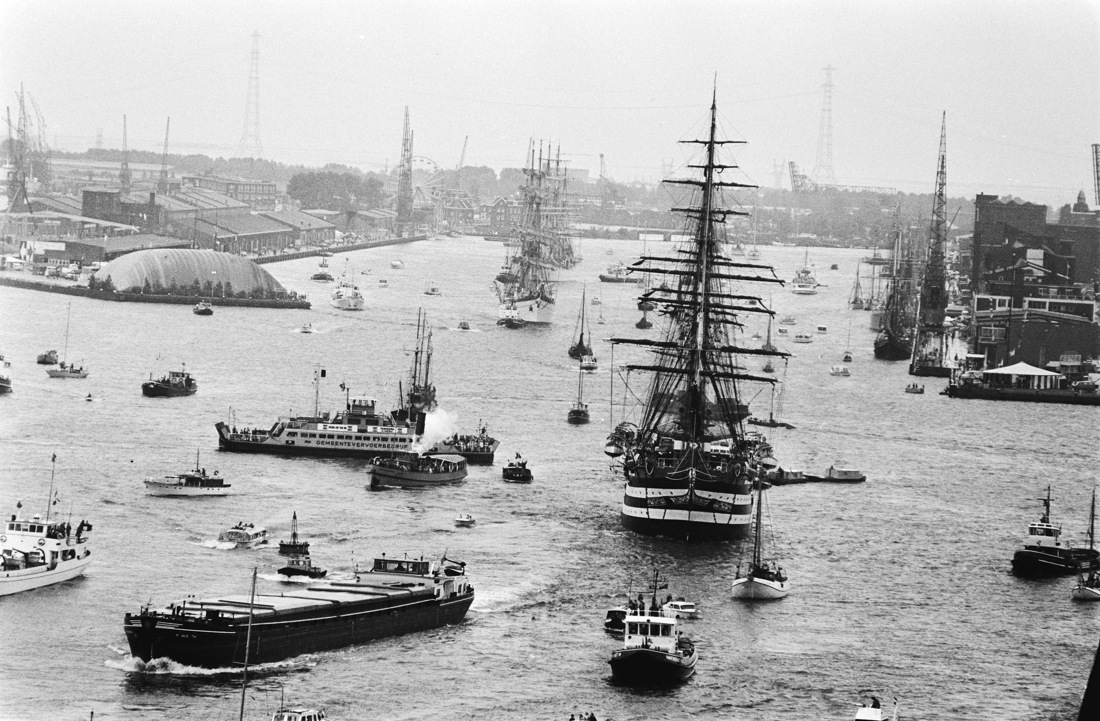 Collectie / Archief : Fotocollectie Anefo Reportage / Serie : Sail 80 Amsterdam Beschrijving : Vertrek van tall-ships: enkele tall-ships verlaten in linie de Javakade (linksboven), op de voorgrond de Amerigo Vespucci Datum : 12 augustus 1980 Locatie : Amsterdam, Noord-Holland Trefwoorden : schepen, zeilschepen Fotograaf : Bogaerts, Rob / Anefo Auteursrechthebbende : Nationaal Archief Materiaalsoort : Negatief (zwart/wit) Nummer archiefinventaris : bekijk toegang 2.24.01.05 Bestanddeelnummer : 930-9586